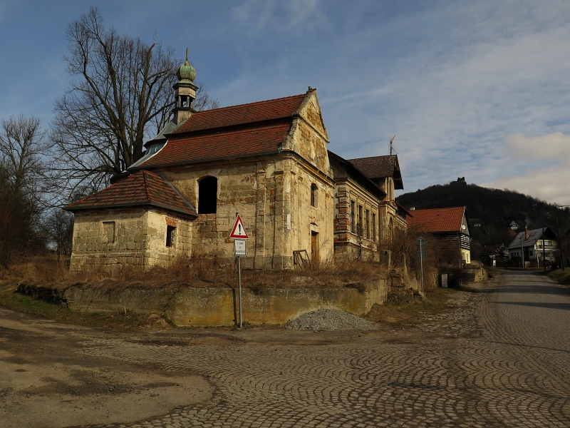 Kaple Nanebevzetí Panny Marie, Vrchovany.